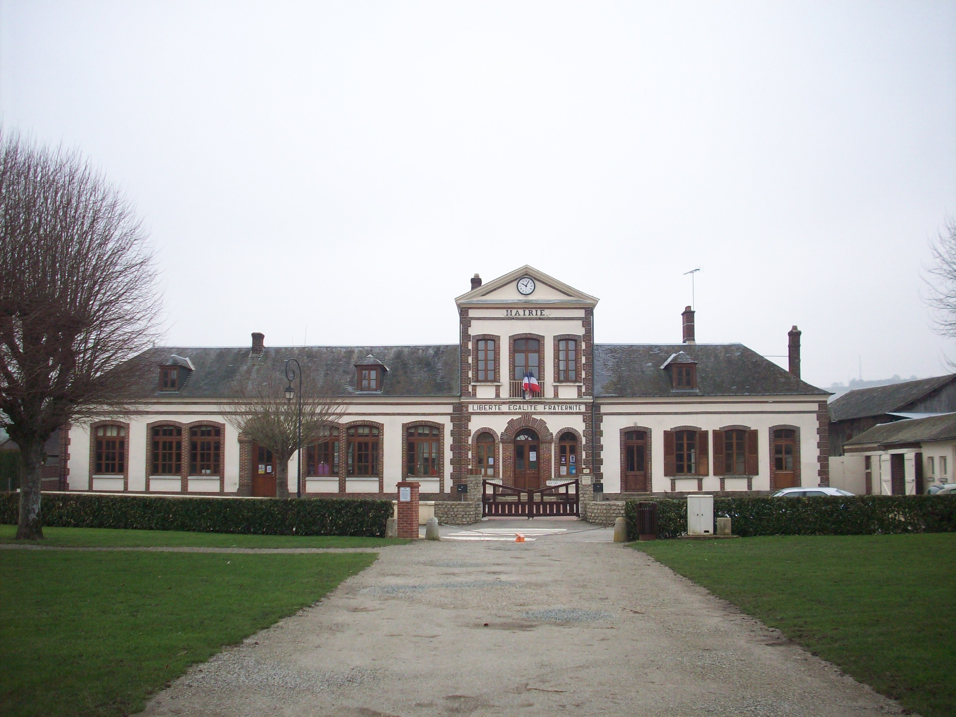 Mairie de Neuf-Marché.